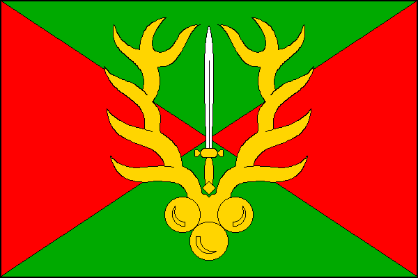 vlajka,Rohle , okres Šumperk